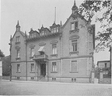 Abbildung des Großherzoglichen Kreisamtes, des Landratsamtes des Kreises Offenbach aus dem Jahr 1905.